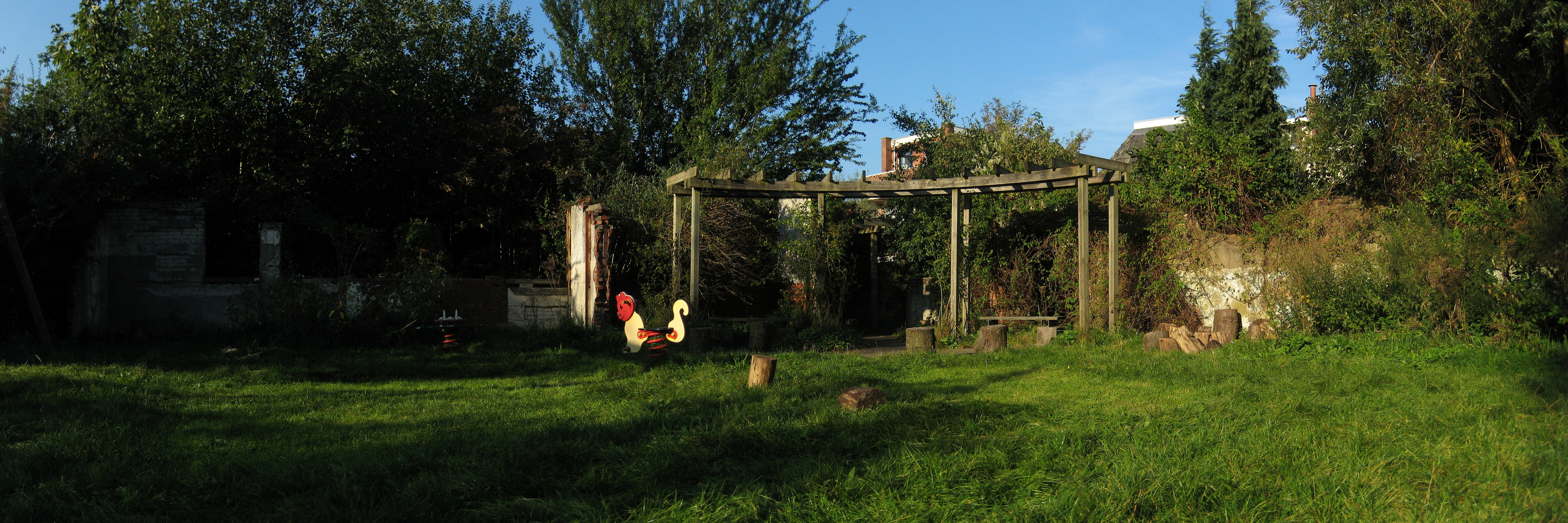 Stadstuin annex speelplaats aan de Mauritsstraat in de Oosterpoortwijk in de stad Groningen. De tuin is vanaf 1998 door vrijwilligers aangelegd op het terrein waar vroeger het Gemeentelijk Huisvestingsbureau stond, waarvan enkele muren zijn blijven staan.